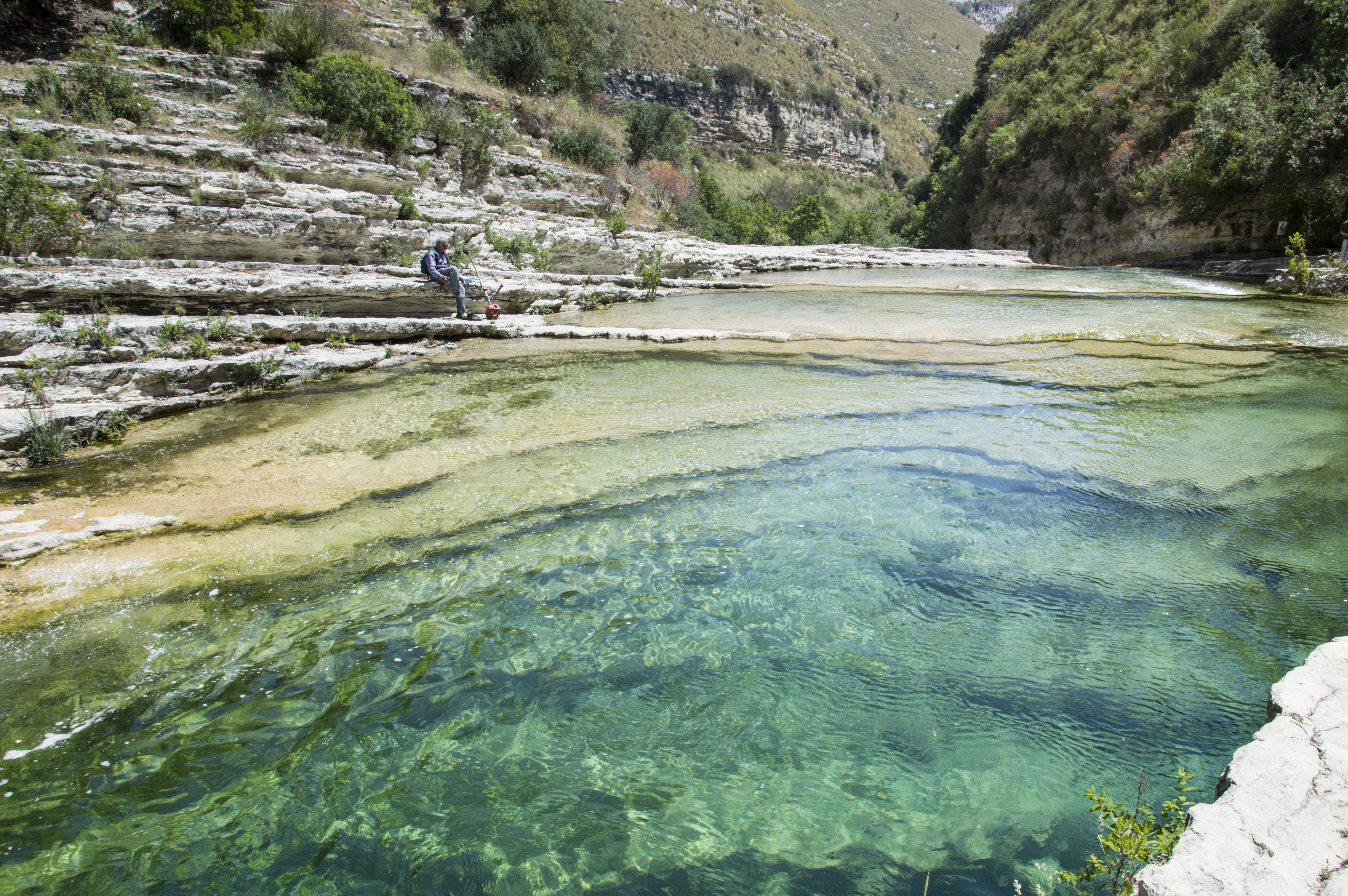 Anfiteatro naturale, Cassibile, Iblei